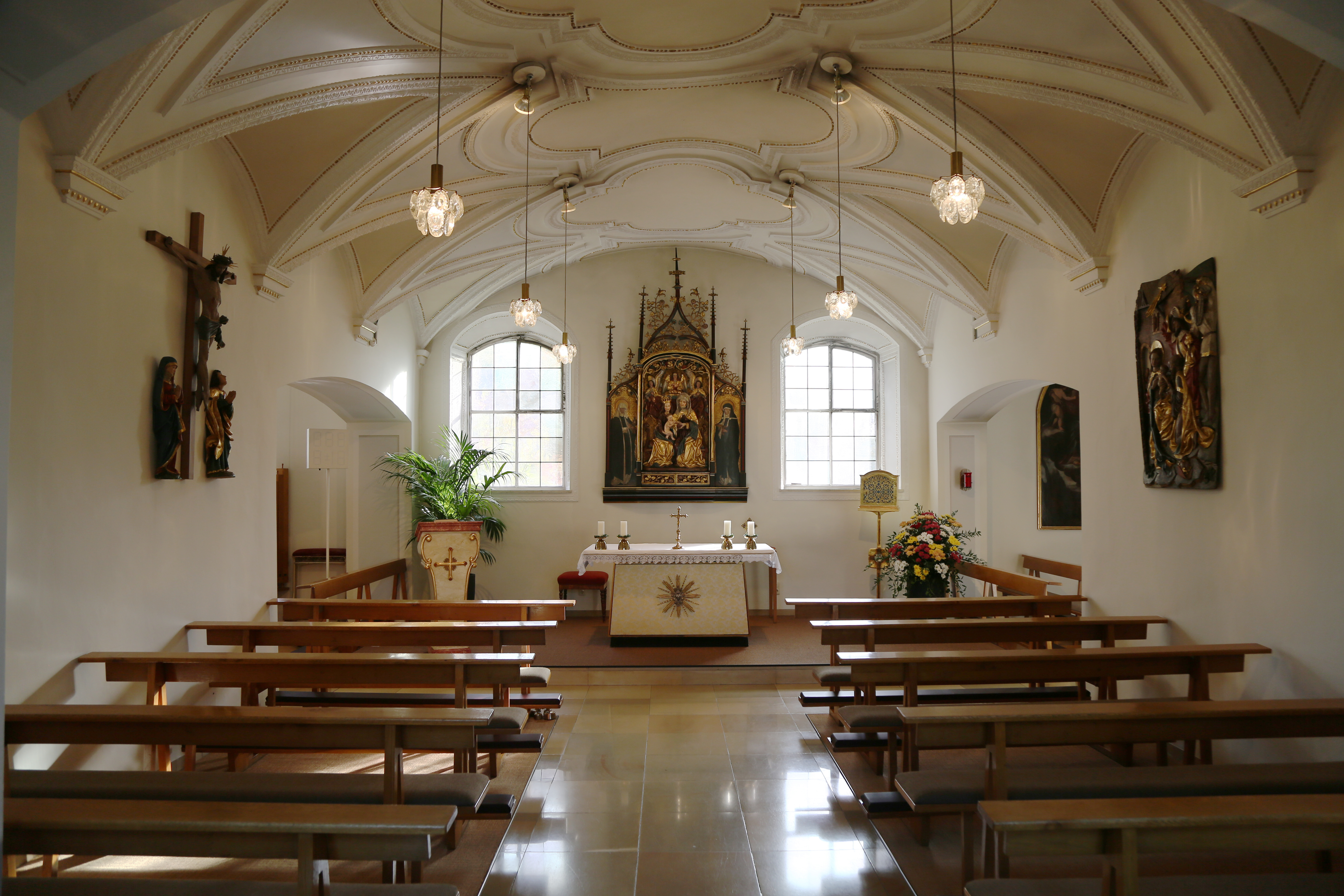 St. Ignatius Kapelle in der Marienanstalt Warnberg. Der Bau ist späte Renaissance im Übergang zum Barock. Die Figurengruppe des Altarbilds ist eine Anna Selbdritt von Erasmus Grasser in einer neugotischen Fassung. An den Wänden drei gotische Flachreliefs aus dem Leben Christi unbekannter Herkunft.